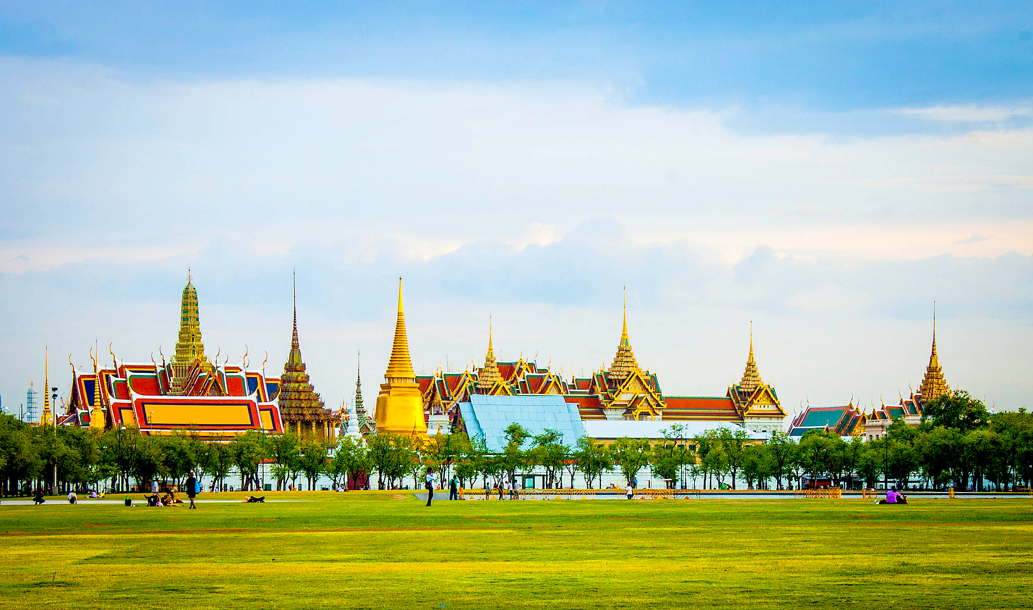 เขตพระนคร กรุงเทพมหานคร